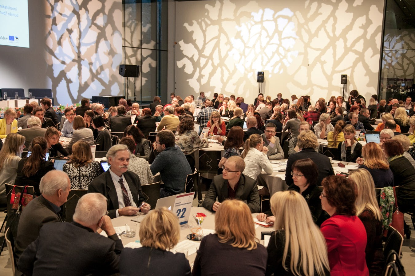 Teaduskommunikatsiooni konverents "Teadus meediastunud maailmas".